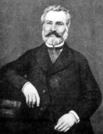 Scansione di una fotografia di Teodorico Pietrocòla Rossetti